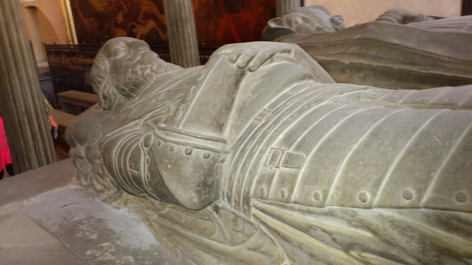 Fältmarskalk Jesper Mattsson Cruus